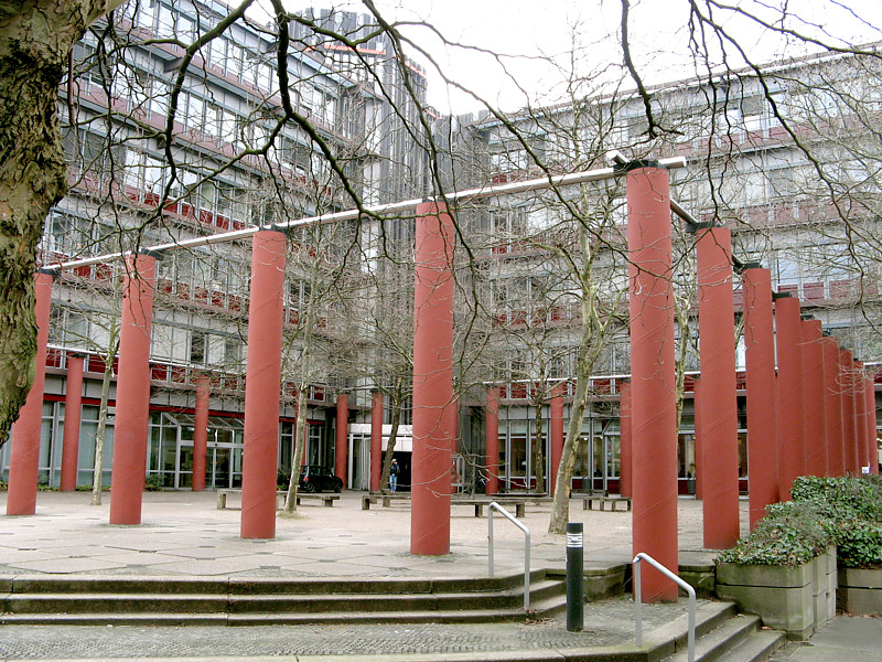 Universität Duisburg-Essen, Campus Essen - Brunnenplatz Universitätsstraße, Ecke Gladbecker Straße